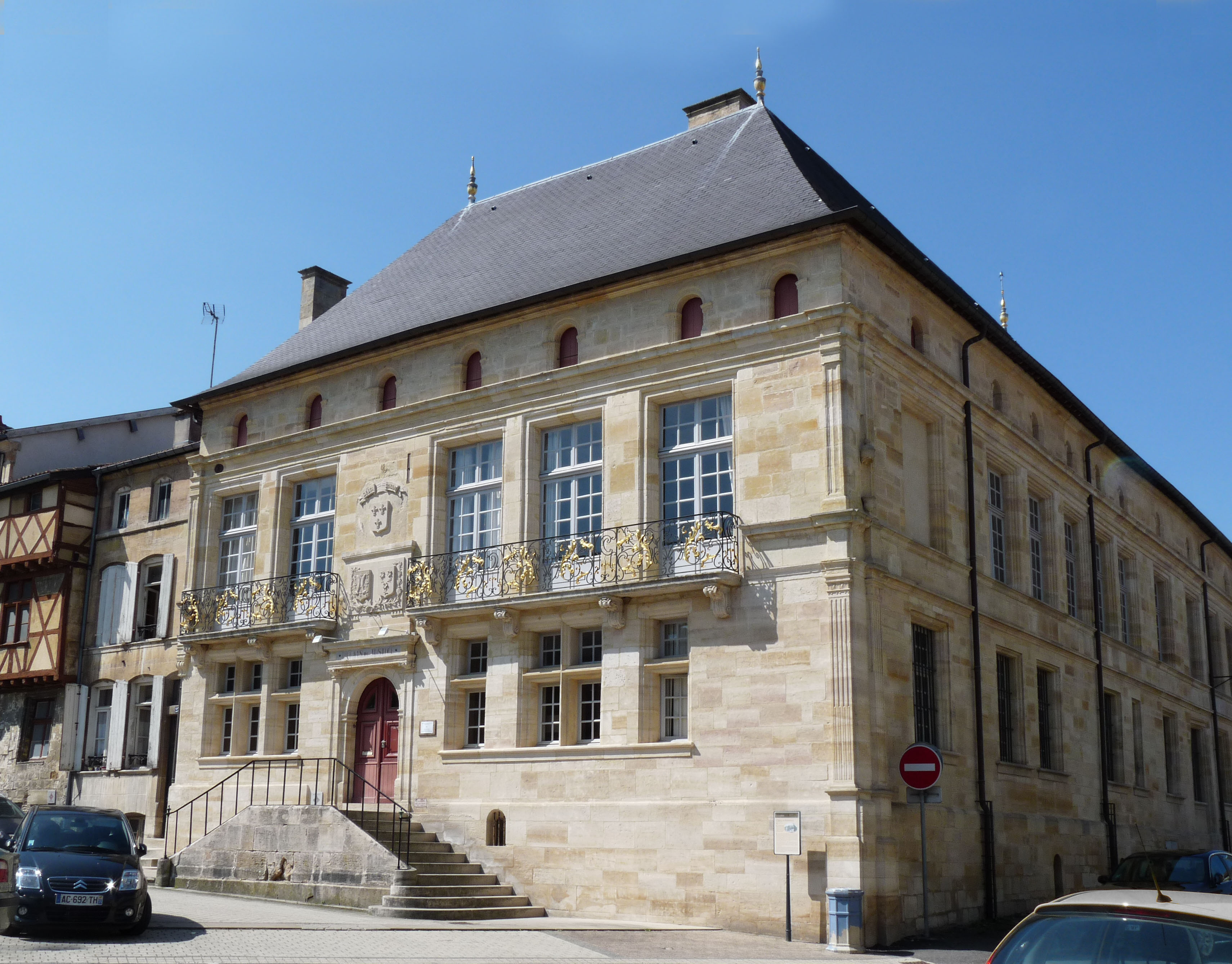 Hôtel de Florainville à Bar-le-Duc (Meuse), au n° 21 de la place Saint-Pierre, dans le Quartier Renaissance de la Ville Haute. Partiellement inscrit aux Monuments historiques en 1988, puis classé en 1992. Abrite le Palais de Justice.